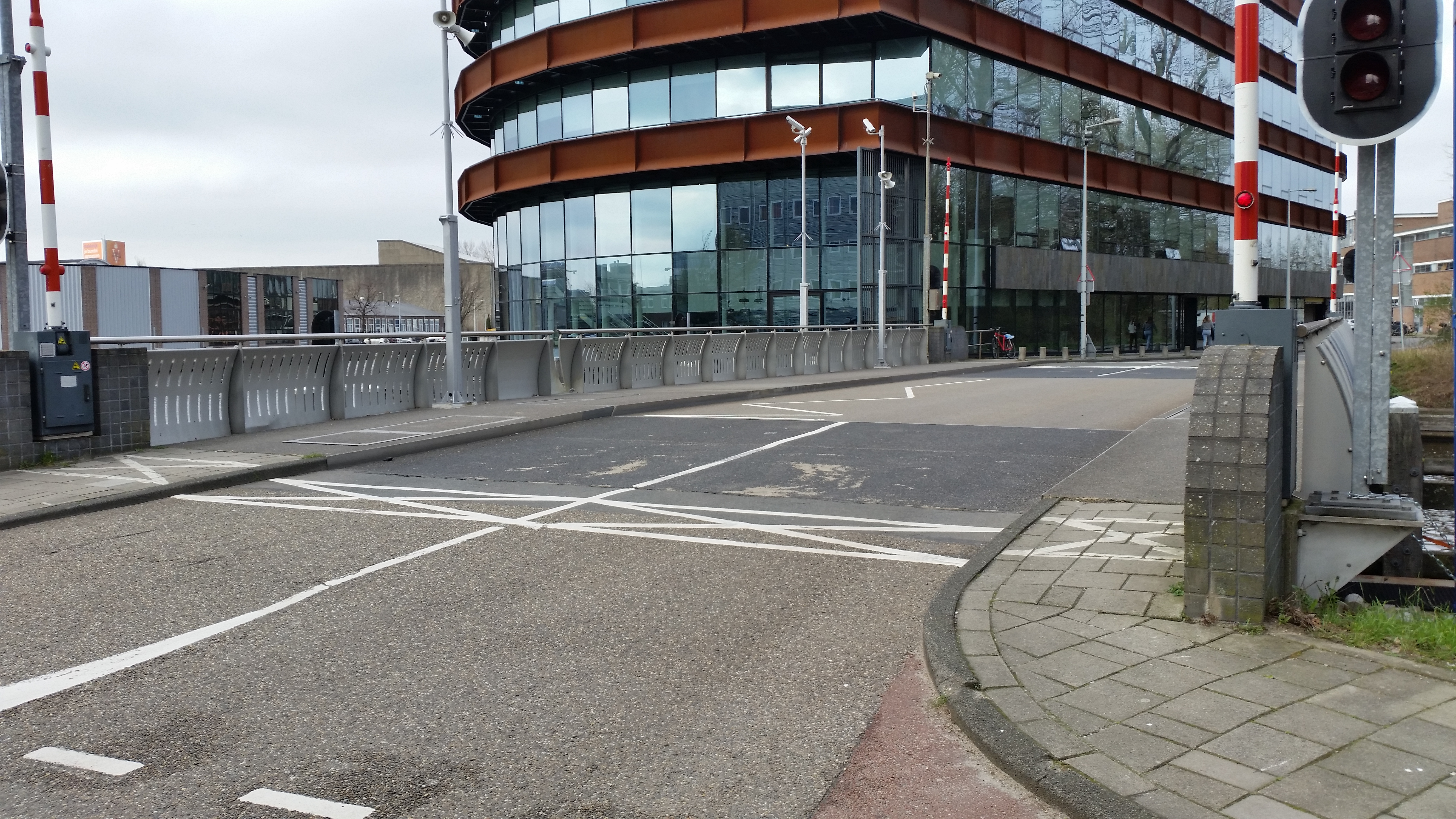 Brug 2208, Uiverbrug, overzicht